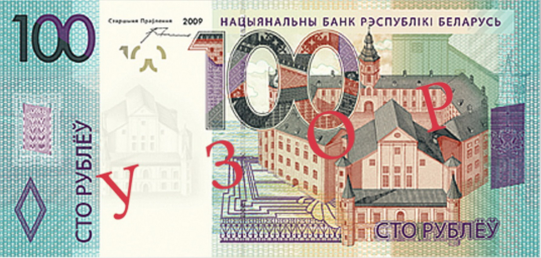 Купюра 100р